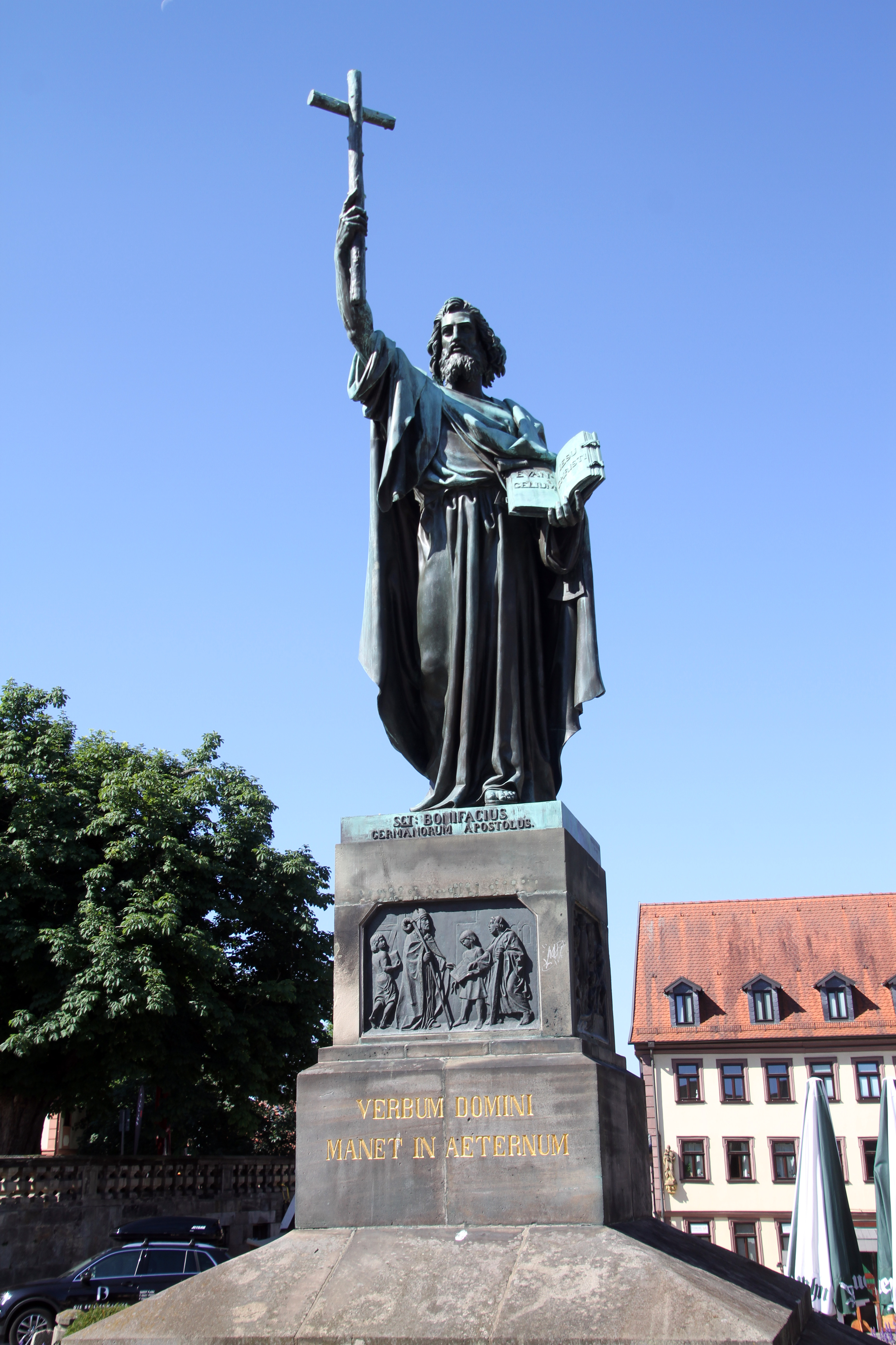 Bonifatiusstatue Fulda